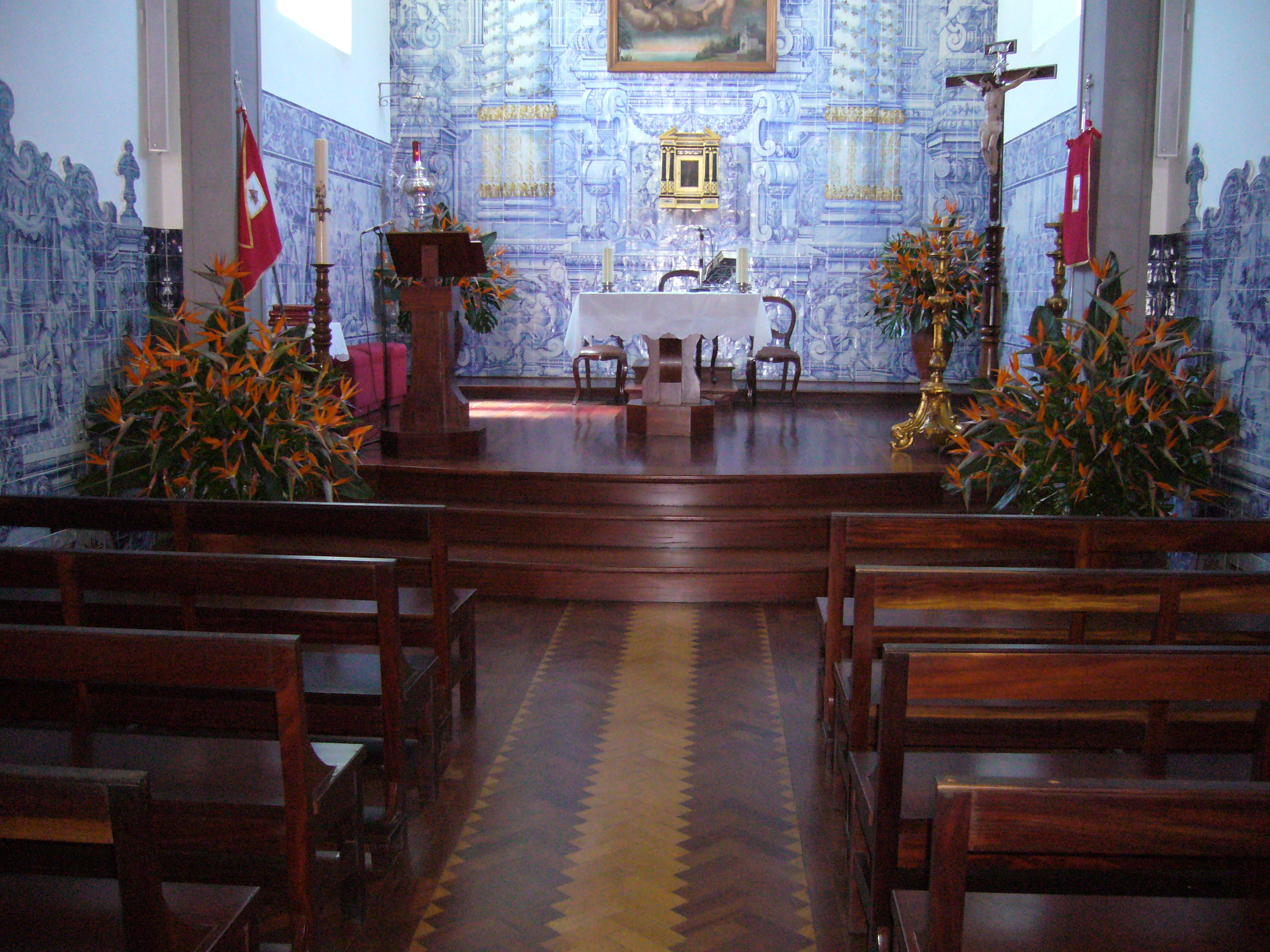 Kostel v Santo António da Serra